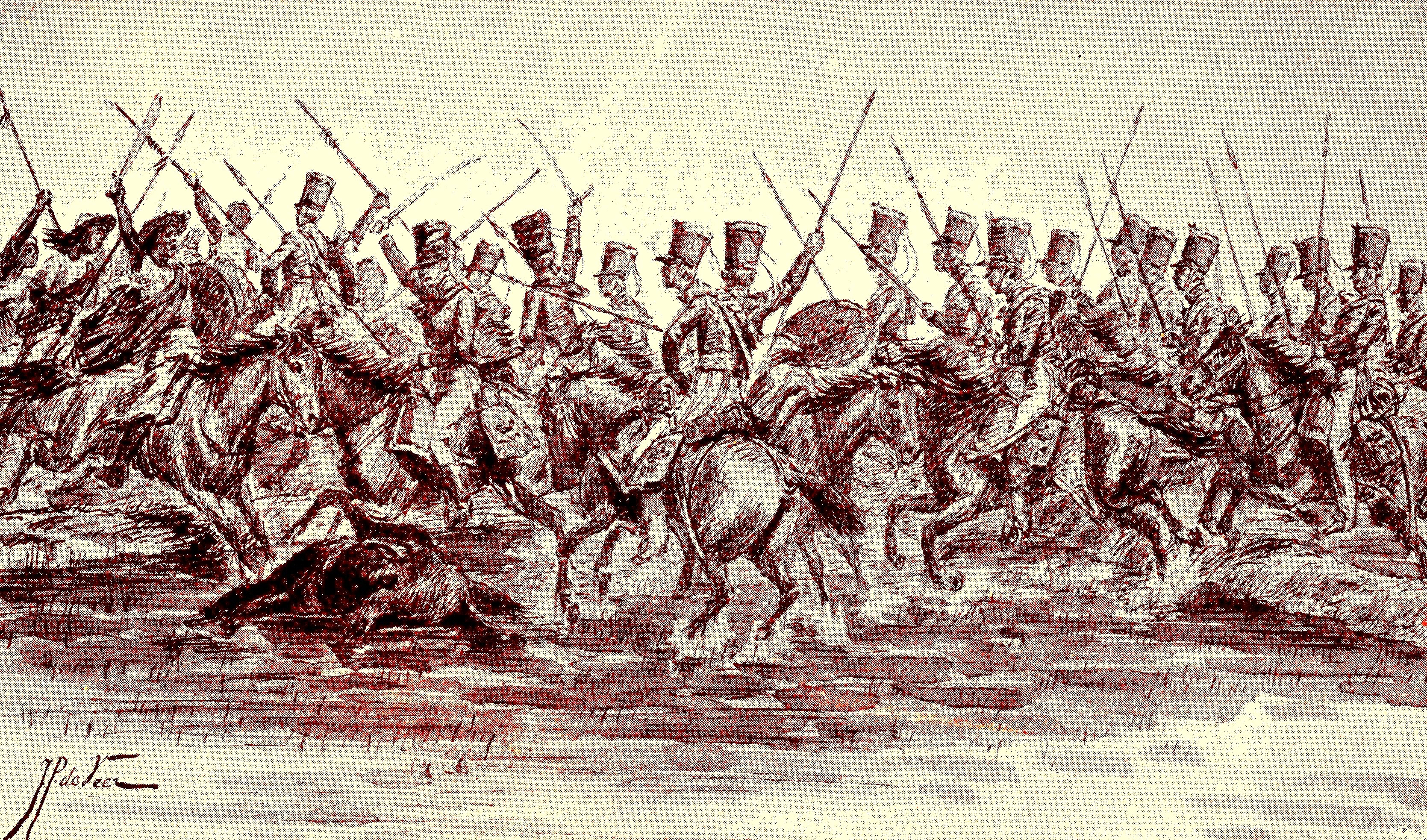 Krachtig optreden onder majoor A.V. Michiels